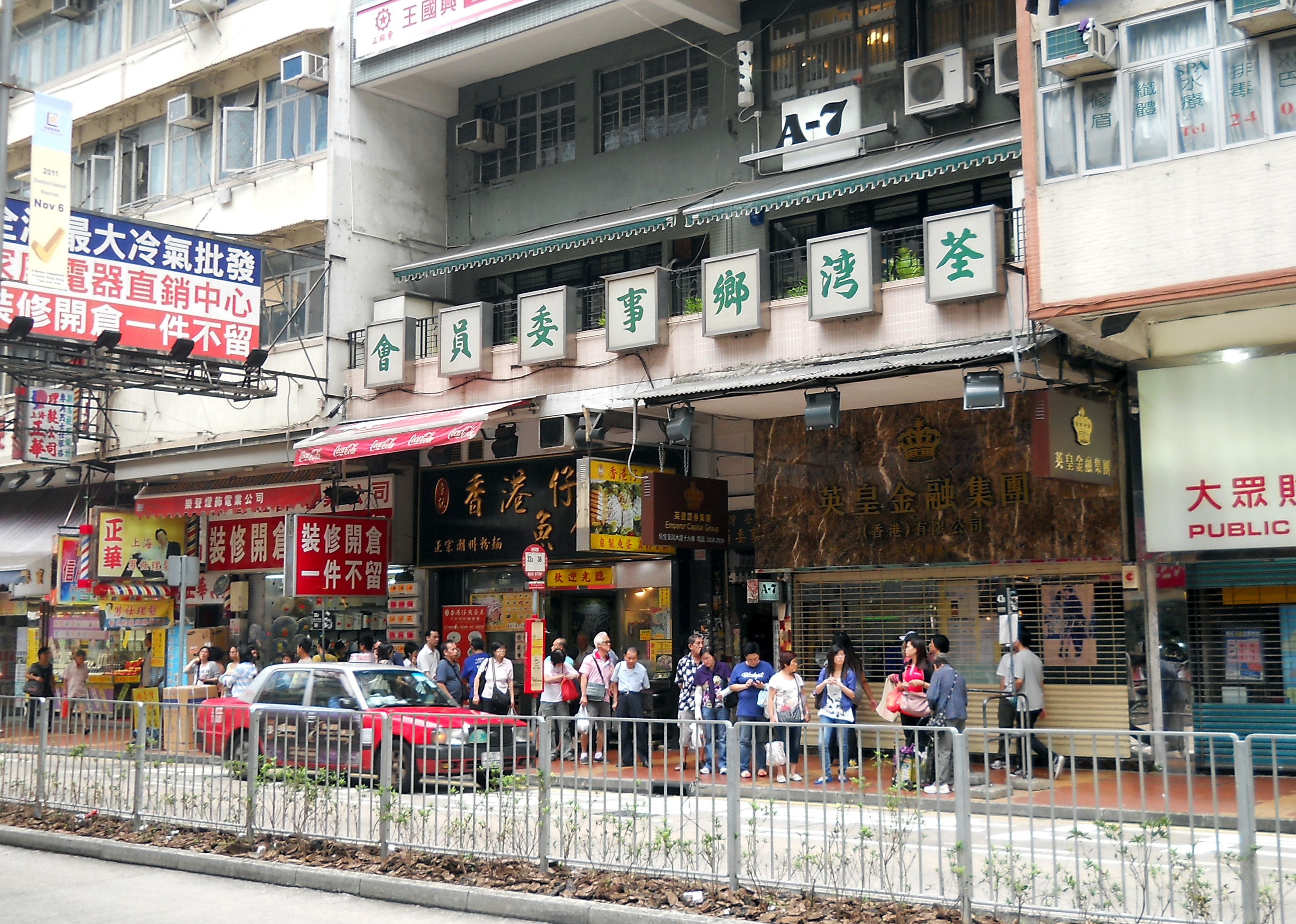 中文（香港）: 荃灣鄉事委員會